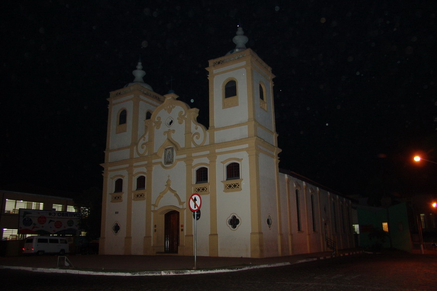 Imagem do município de Atibaia, estado de São Paulo, Brasil.